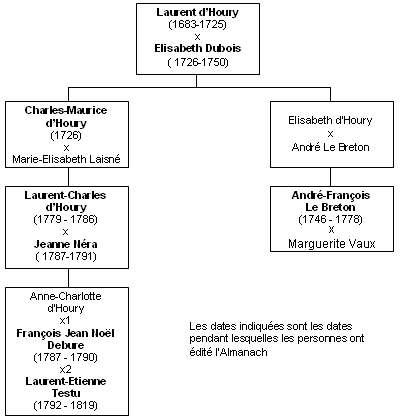 Généalogie abrégée de la famille d'Houry, libraires imprimeurs de l'Almanach Royal